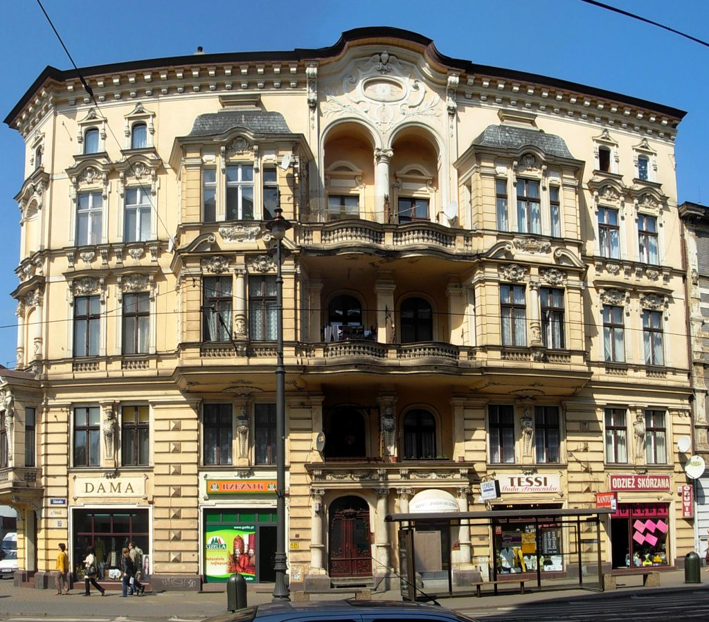 Kamienica ul. Gdańska 63 w Bydgoszczy